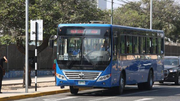 Buz azul del corredor complementario Javier Prado - La Marina, perteneciente al Sistema Integrado de Transporte de Lima.